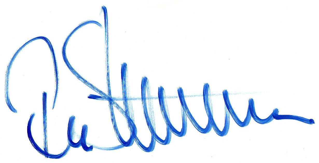 Autogramm von Per Stureson